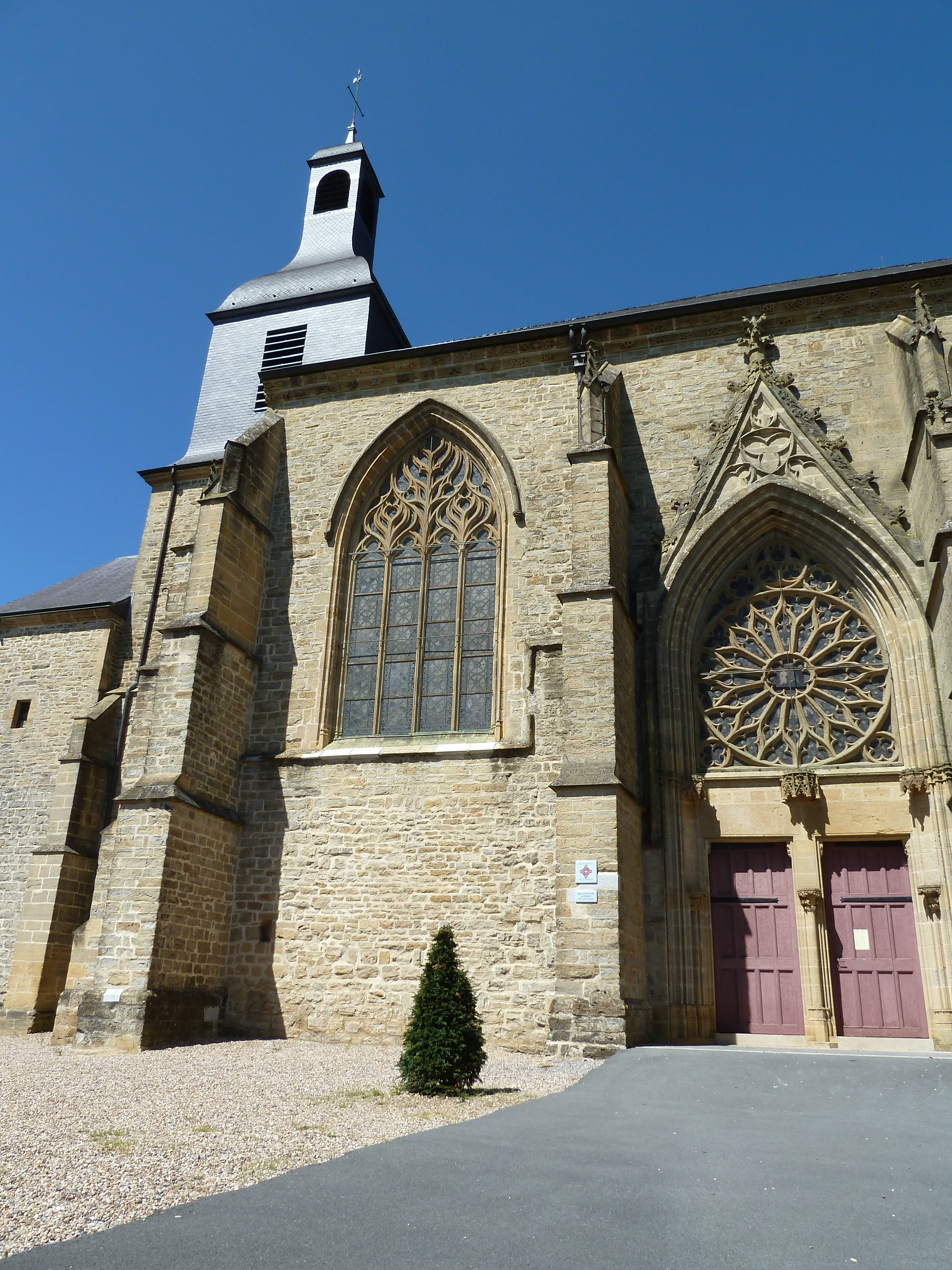 L'église est située sur la commune de Renwez, dans le département français des Ardennes